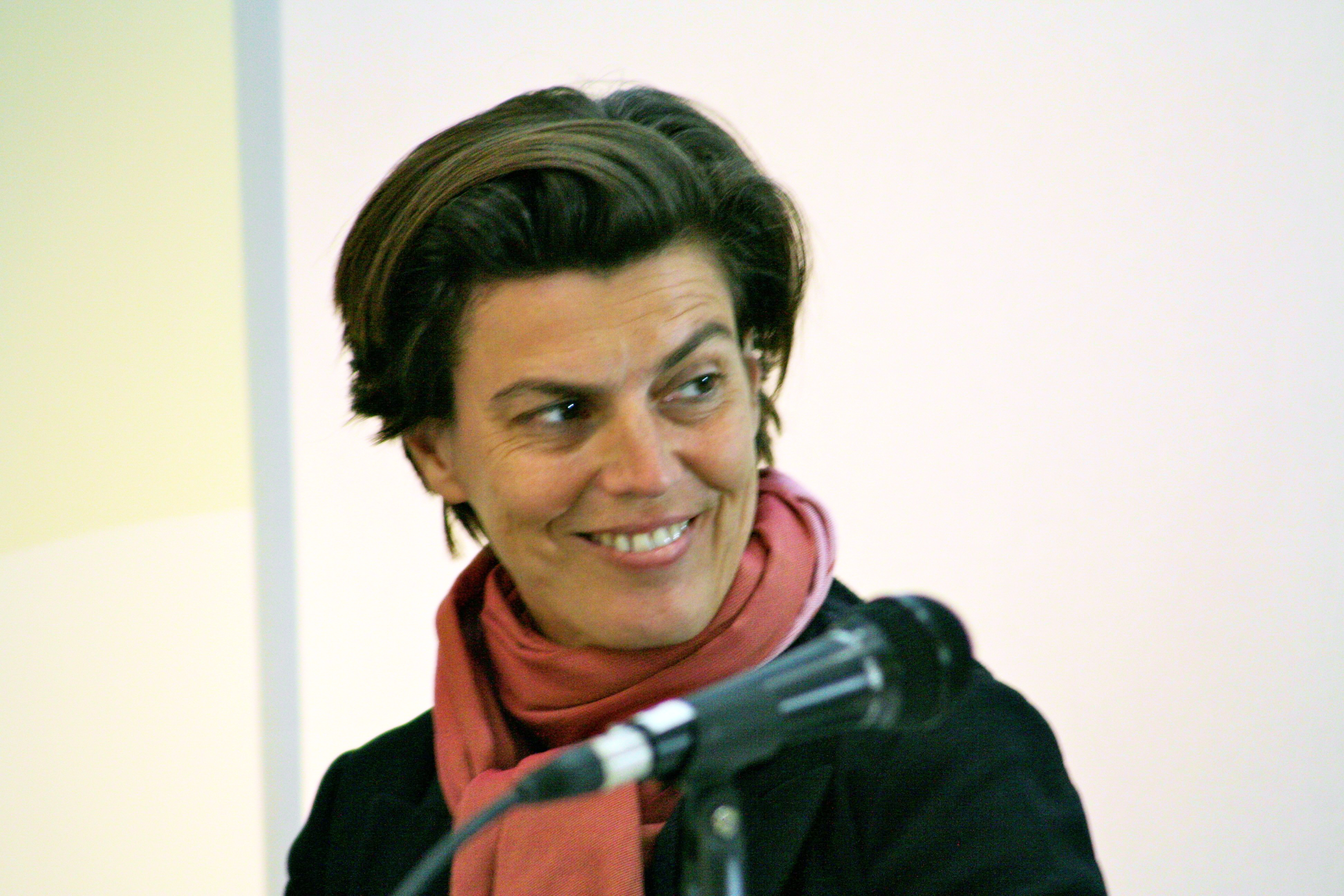 Carolin Emcke, deutsche Publizistin, auf der Leipziger Buchmesse 2012